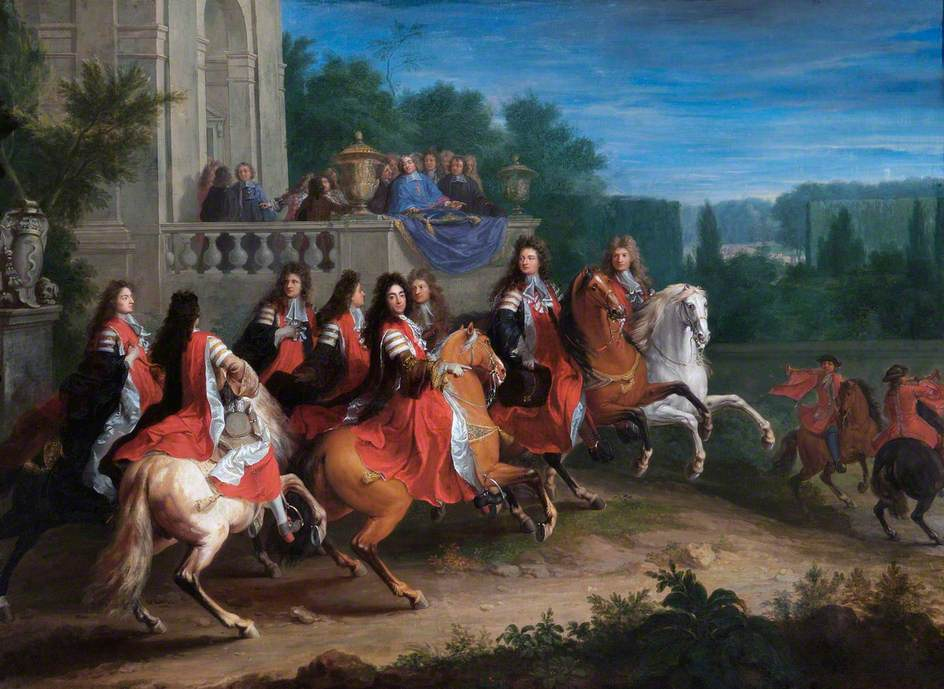 Tableau de la "famille Colbert", sans précision sur les personnages représentés. Tableau réalisé vers 1680-1683.